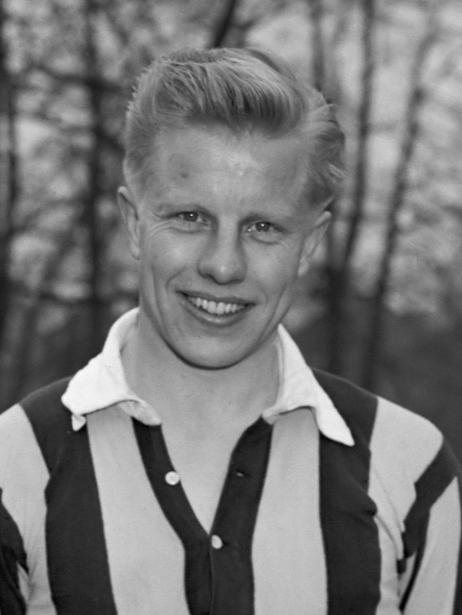 Sjaak Alberts (Vitesse Arnhem) invaller Nederlands elftal 24 maart 1952